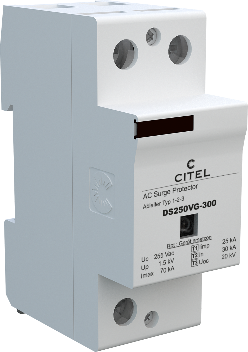 einpoliger Kombiableiter Typ1+2+3 auf Basis einer gasgefüllten Funkenstrecke in Kombination mit einem Hochleistungsvaristor